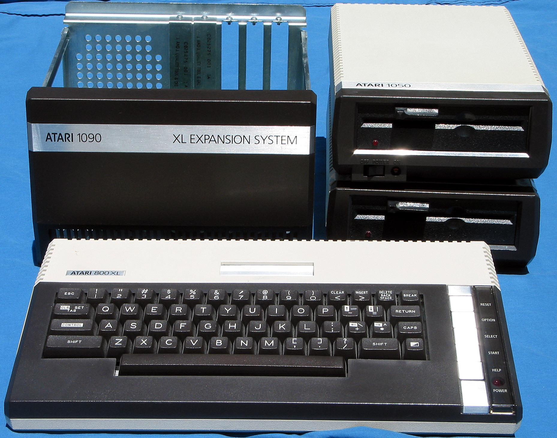 Atari 800XL mit Floppy 1050 und Erweiterungssystem 1090